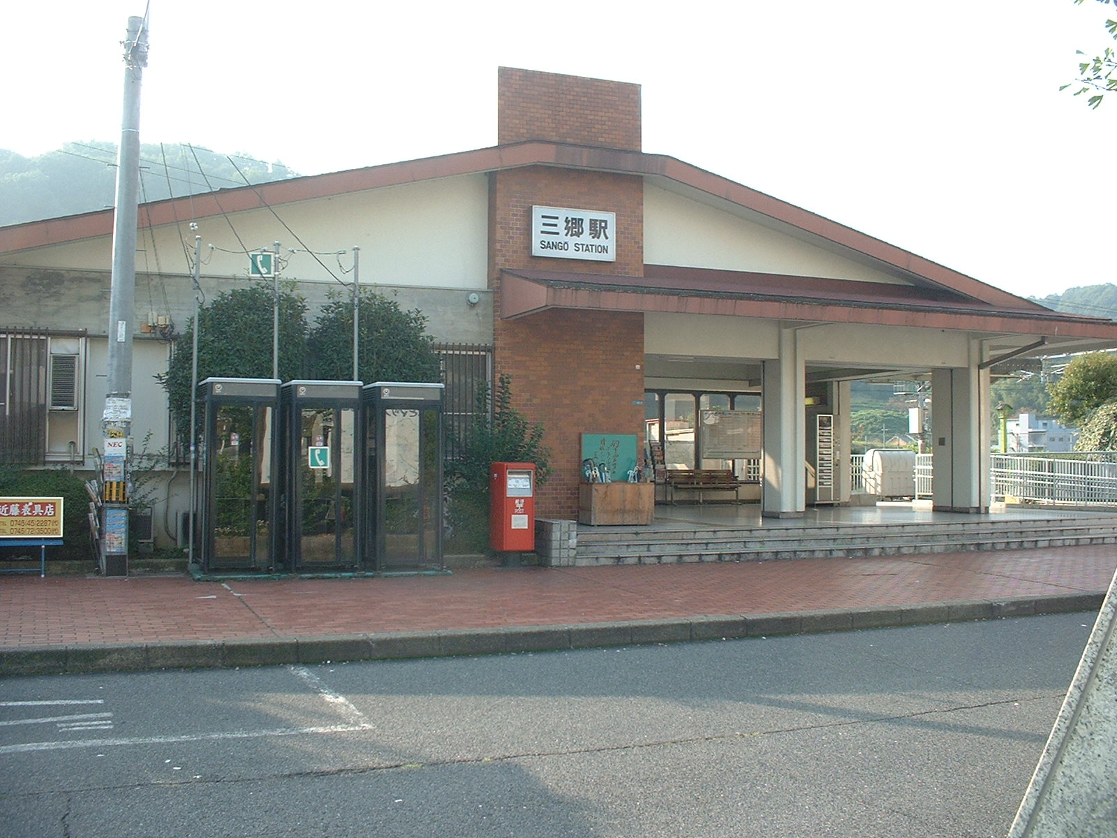 西日本旅客鉄道関西本線（大和路線）三郷駅。奈良県生駒郡三郷町。